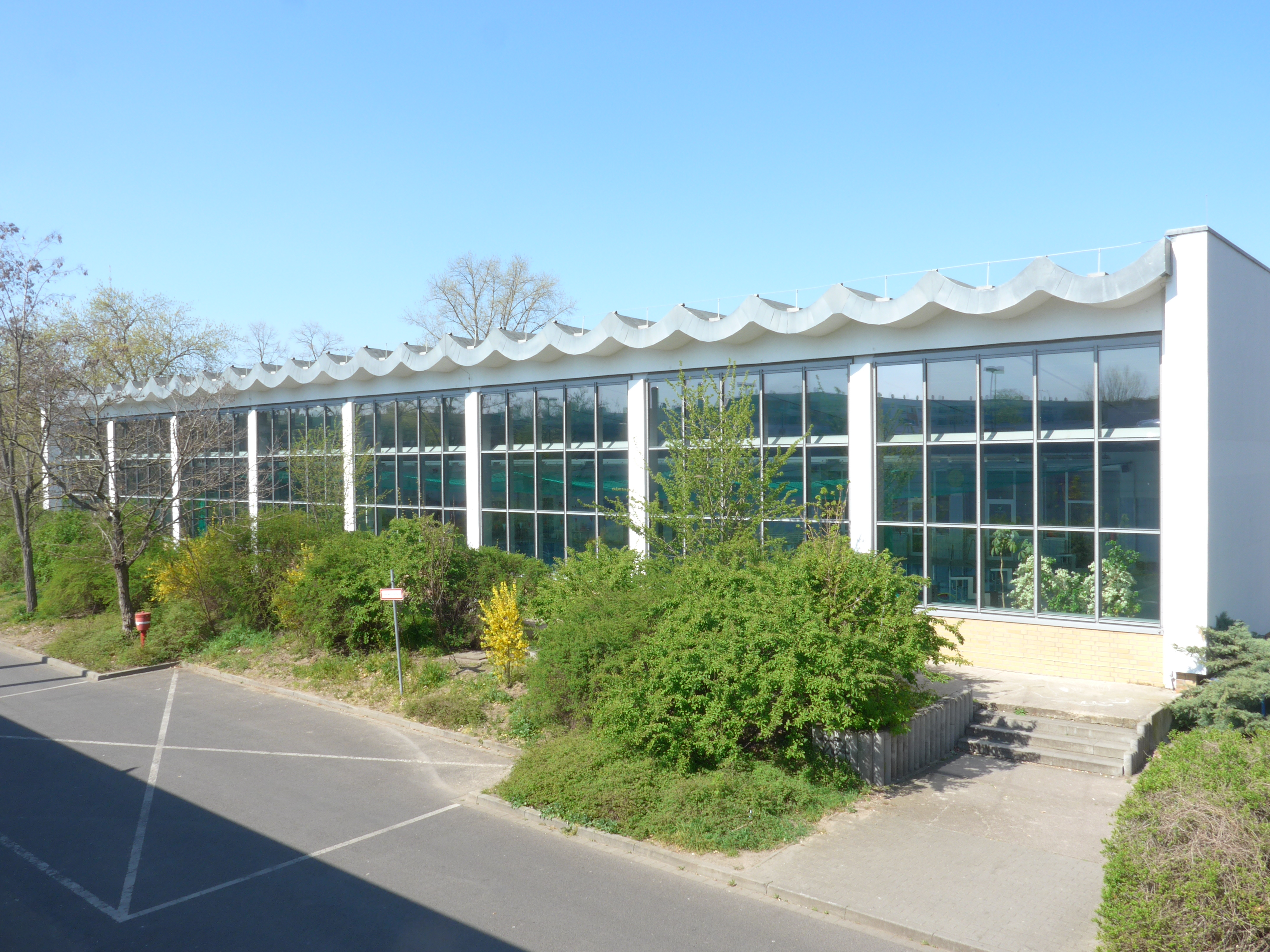 Schwimmhalle Allendeviertel der Berliner Bäderbetriebe - Blick vom Allende-Center